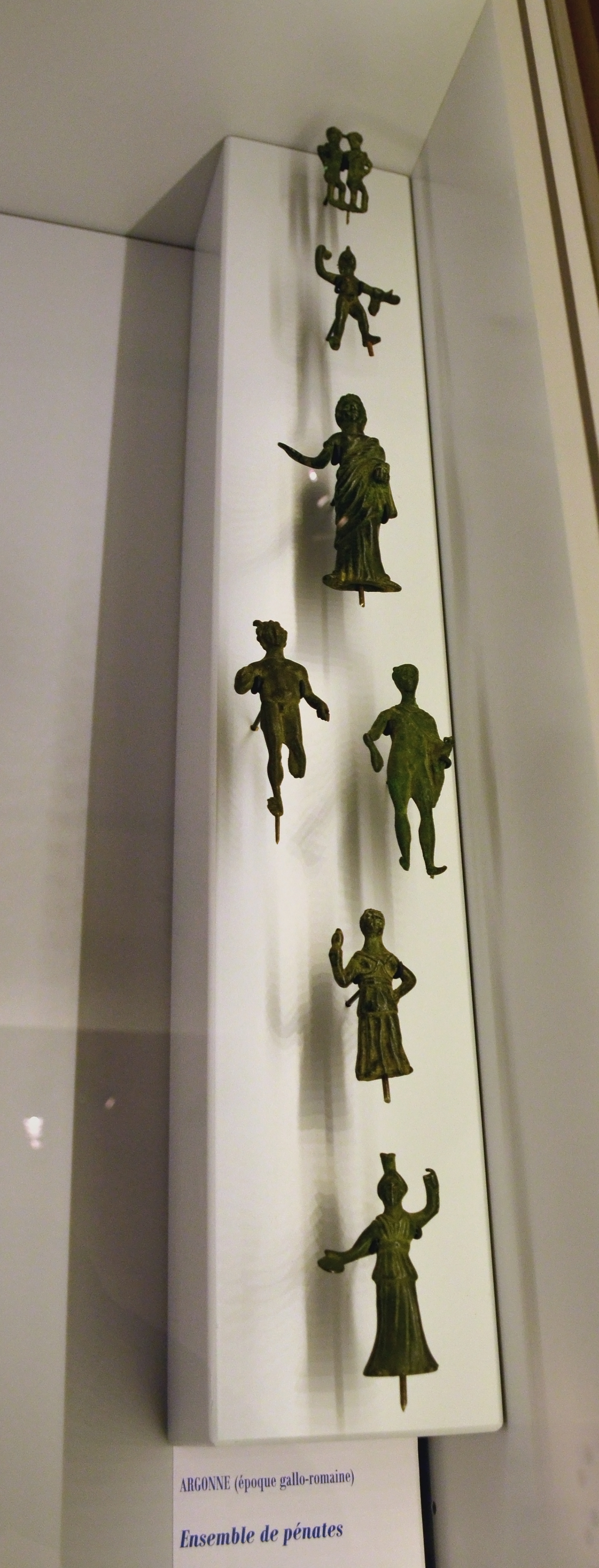 Ensemble de Pénates, bronze, époque gallo-romaine, découvert en Argonne. Musée d'Art et d'Histoire de Sainte-Menehould.